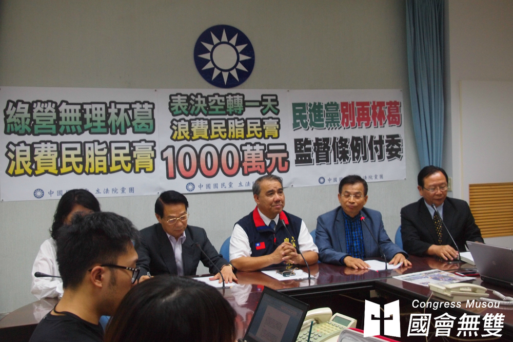 中文（台灣）: 立法院今（8）日下午院會，國民黨團用人數優勢欲將〈兩岸監督條例〉送入內政委員會審查，但台聯黨團隨即提出349個變更議程案阻擋，在民進黨團配合下成功拖延。國民黨黨團隨即集體退席，主席洪秀柱只好宣布散會，下周二再繼續討論。